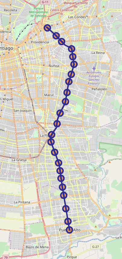 Mapa con el recorrido de la Línea 4 del Metro de Santiago